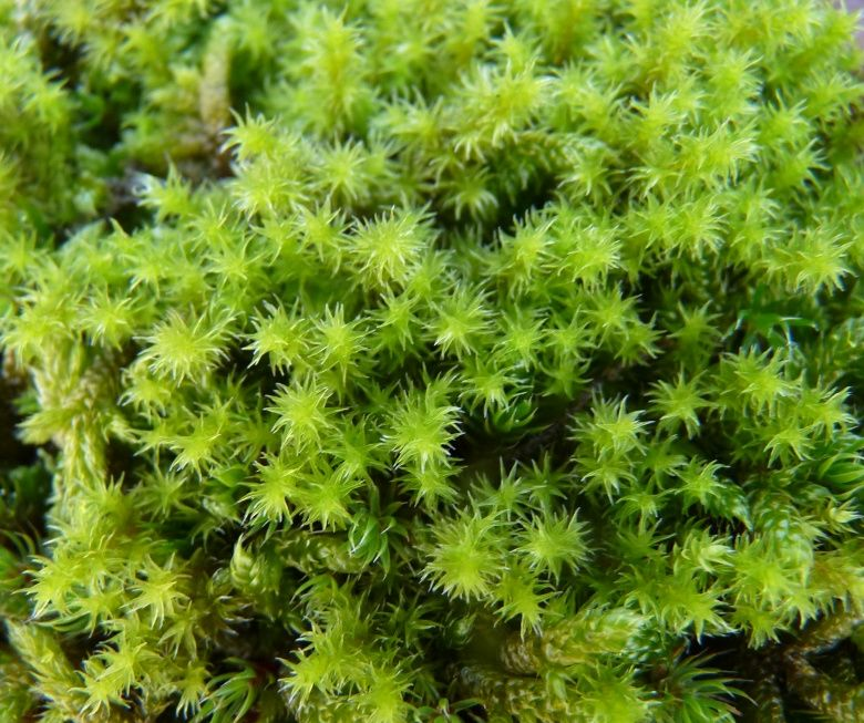 Bryophyte rhacomitrium canescen